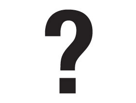 Hein